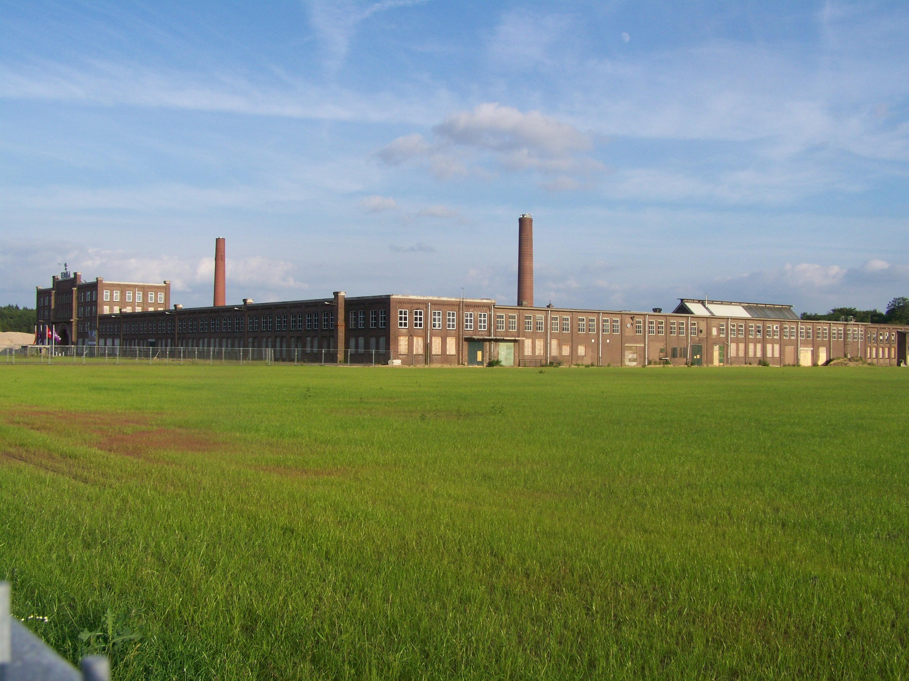 Enka westvleugel fabrieksgebouw met poort 1928